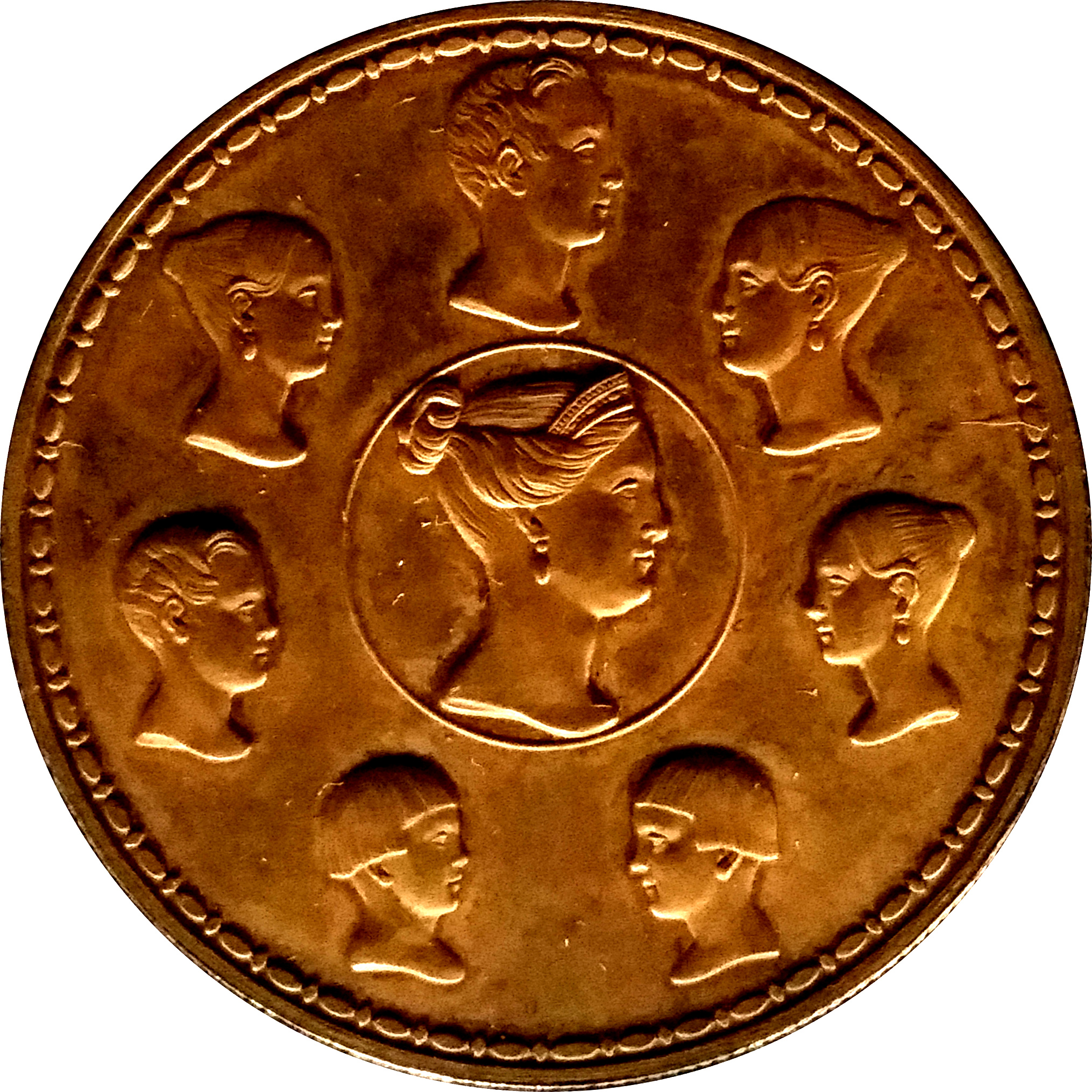 rubel familijny 1836